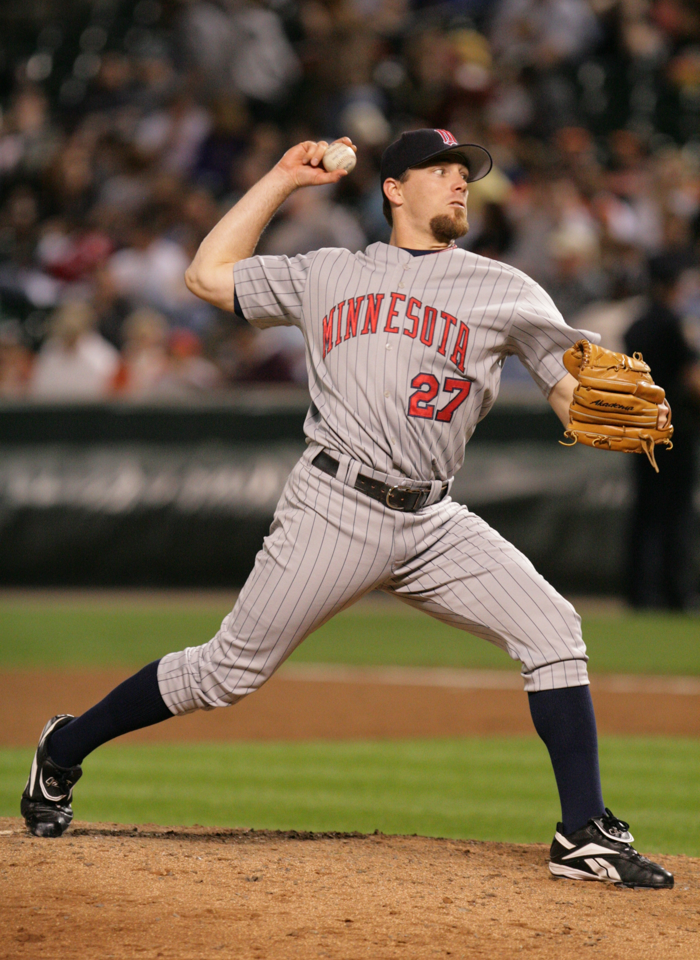 Willie Eyre